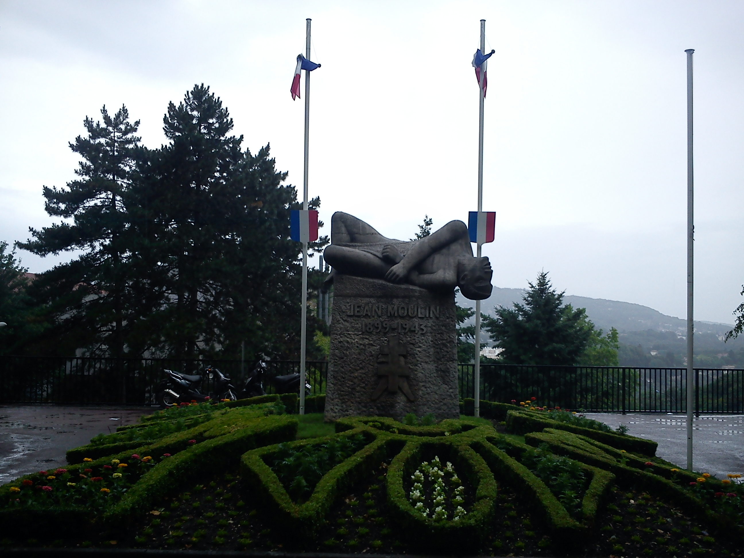 Stèle à l'effigie de Jean Moulin (1899-1943), à Caluire-et-Cuire.